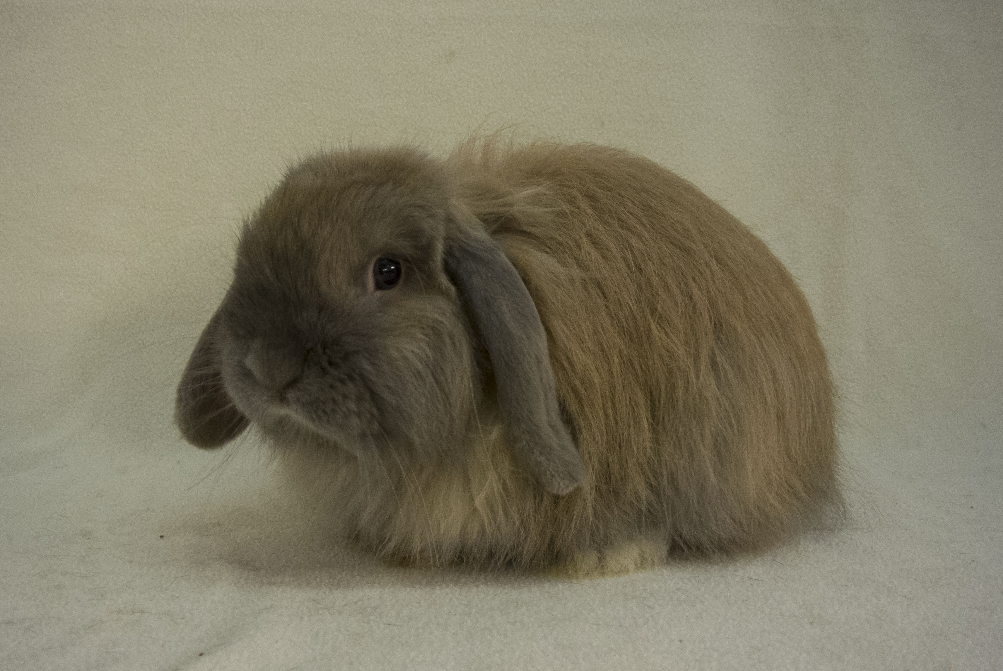 Beige